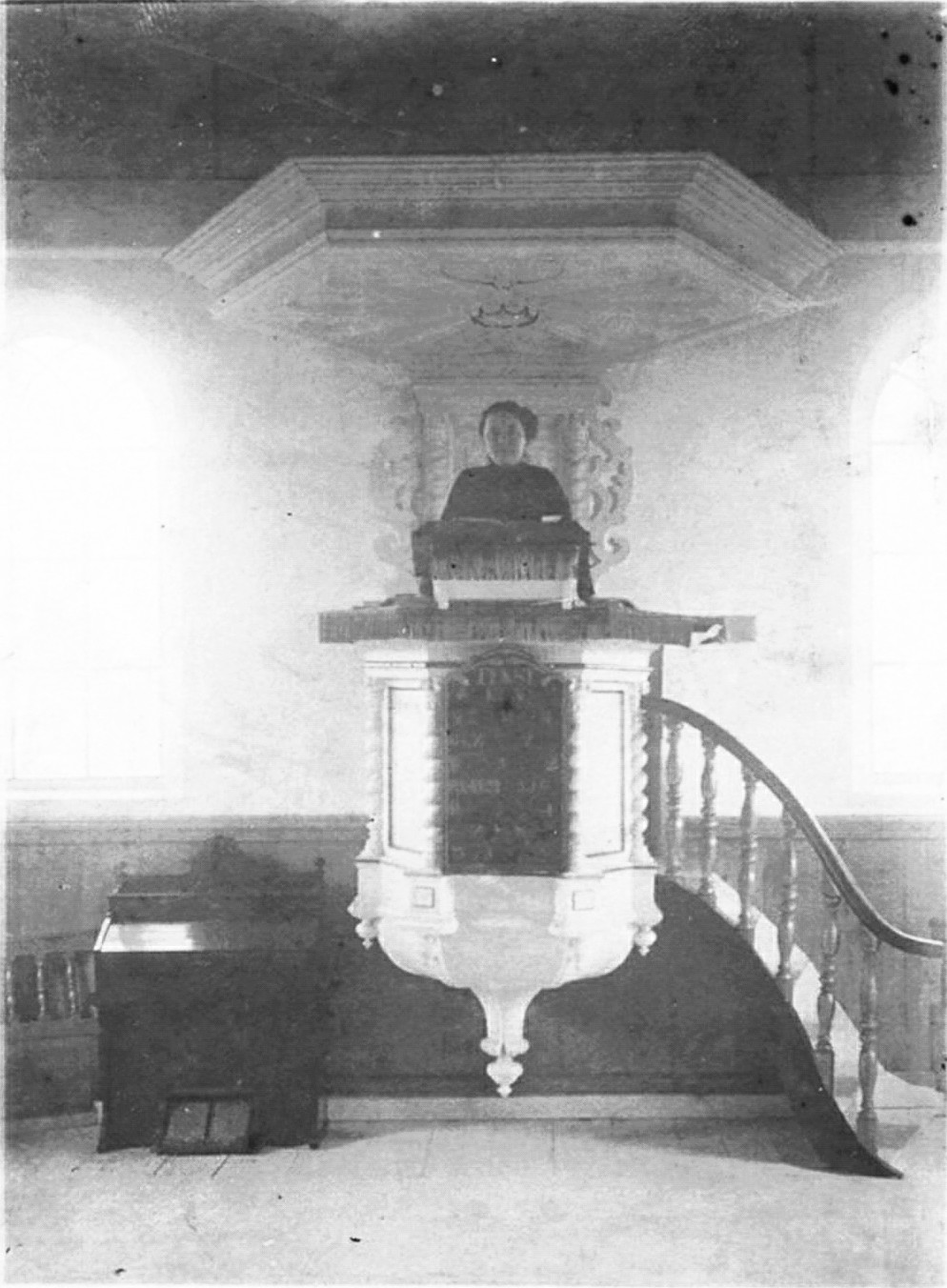 Anne Zernike: de eerste vrouw op de kansel